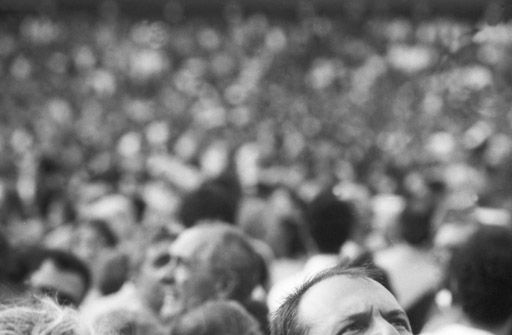 Blick #55. Fotozyklus Augenblicke